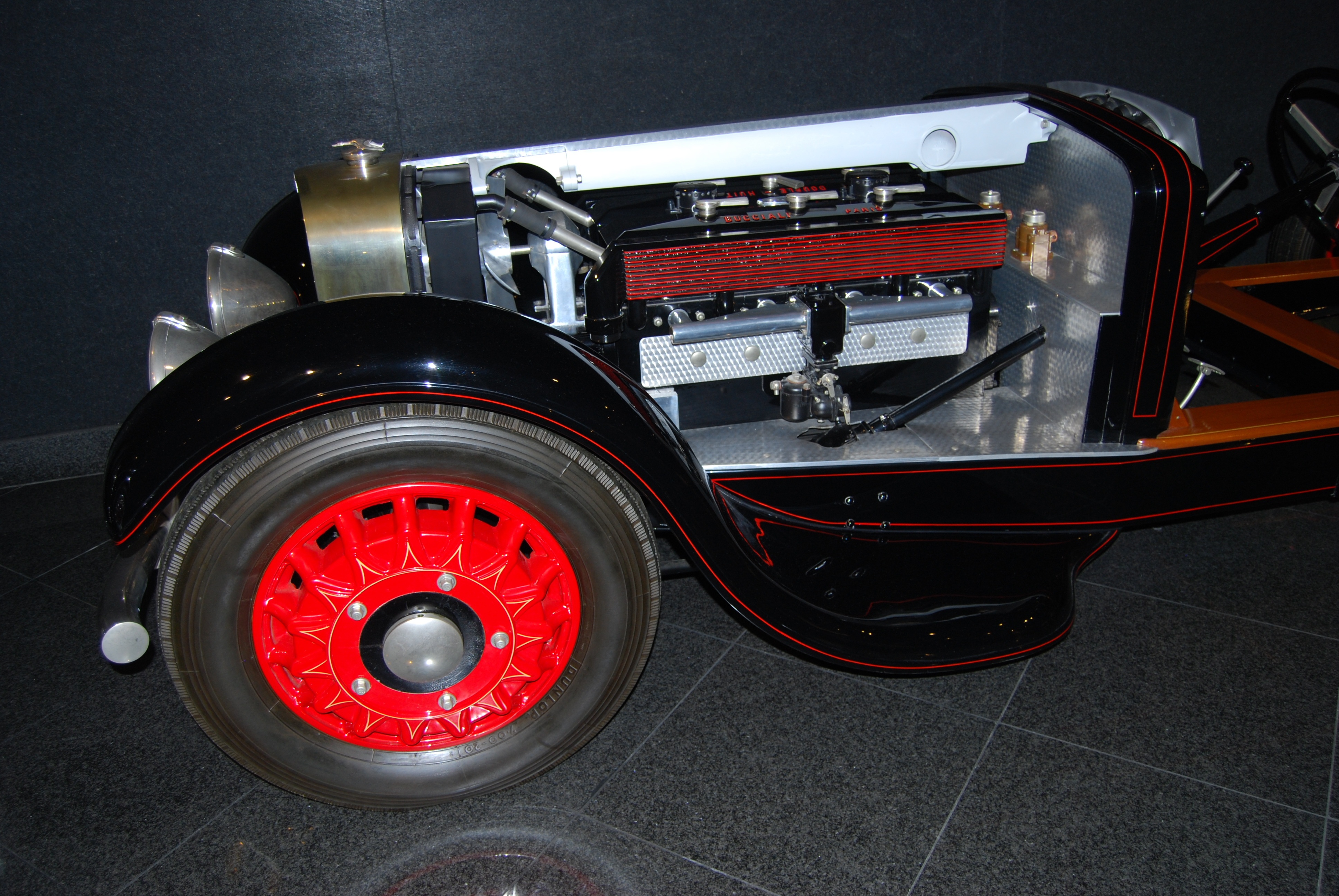 F_DSC_0706